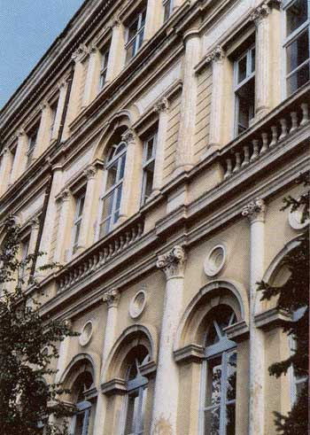 Детал од фасадата на гимназијата „Јосип Броз - Тито“ во Битола